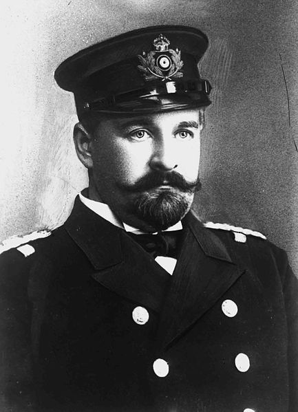 BildNr 018-0081-26 aus dem Bildbestand der Deutschen Kolonialgesellschaft in der Universitätsbibliothek Frankfurt am Main